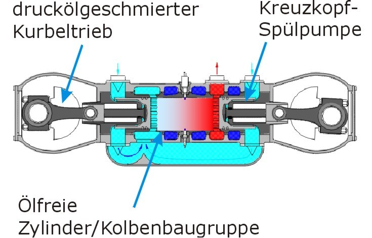 Prinzip des Motors in Kreuzkopf-Bauart